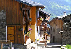 rue feissons sur salins